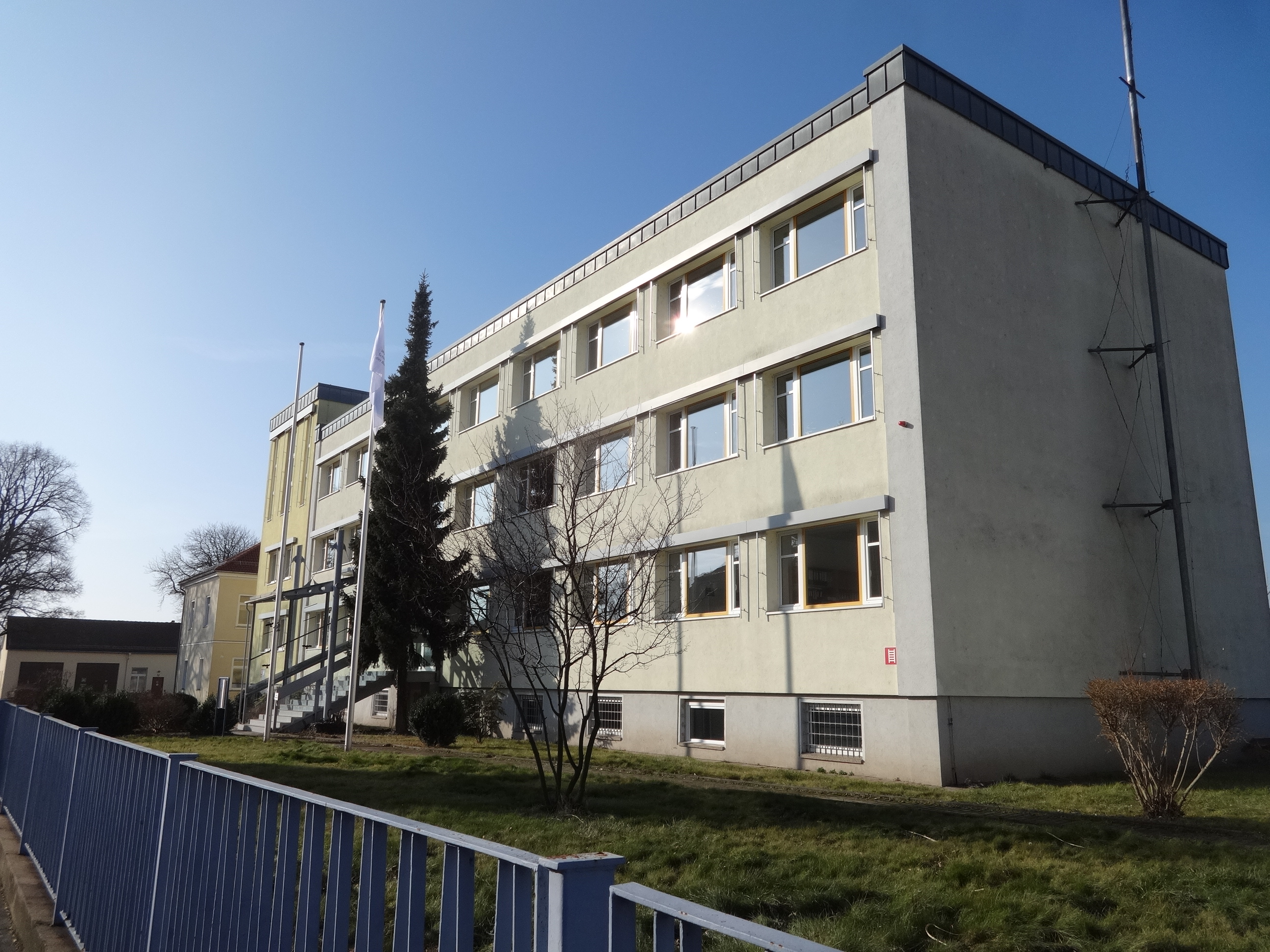 Wasser- und Schifffahrtsamt Dresden, Blick von Osten